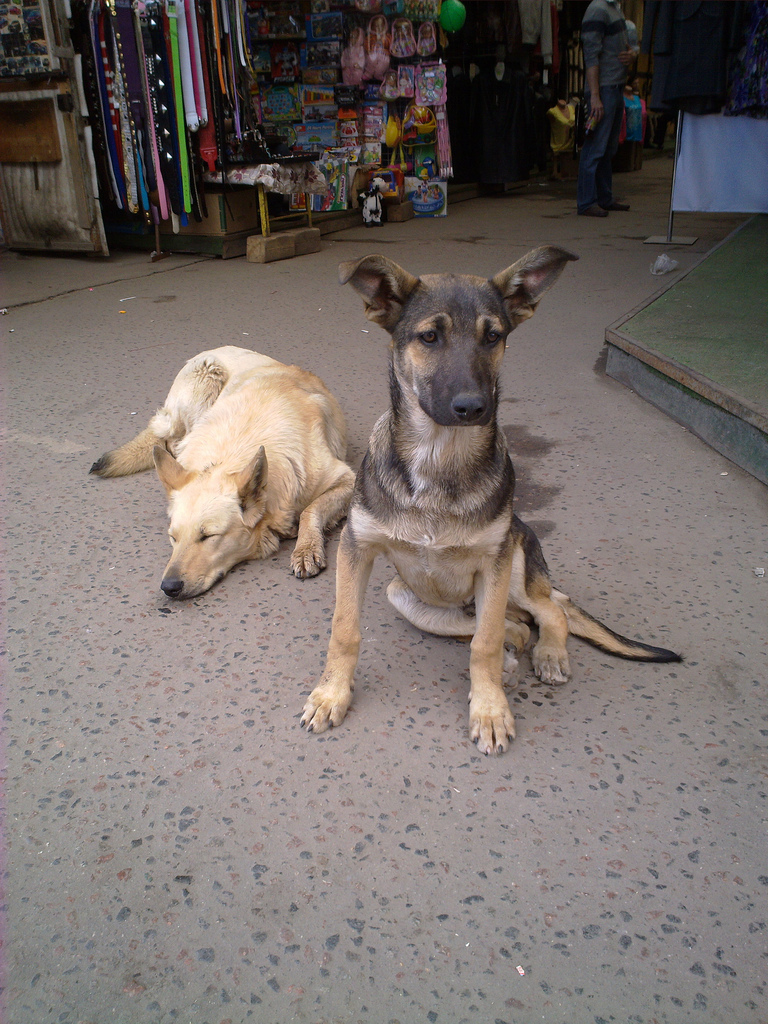 Street Dogs